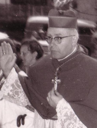 Bischof Josef Stangl bei der Prozession zur Obernauer Kapelle "Maria Frieden", anlässlich des Kapellenfestes 1.Maisonntag (Fest Kreuzauffindung). Patrozinium 2. Septembersonntag (Fest Kreuzerhöhung).